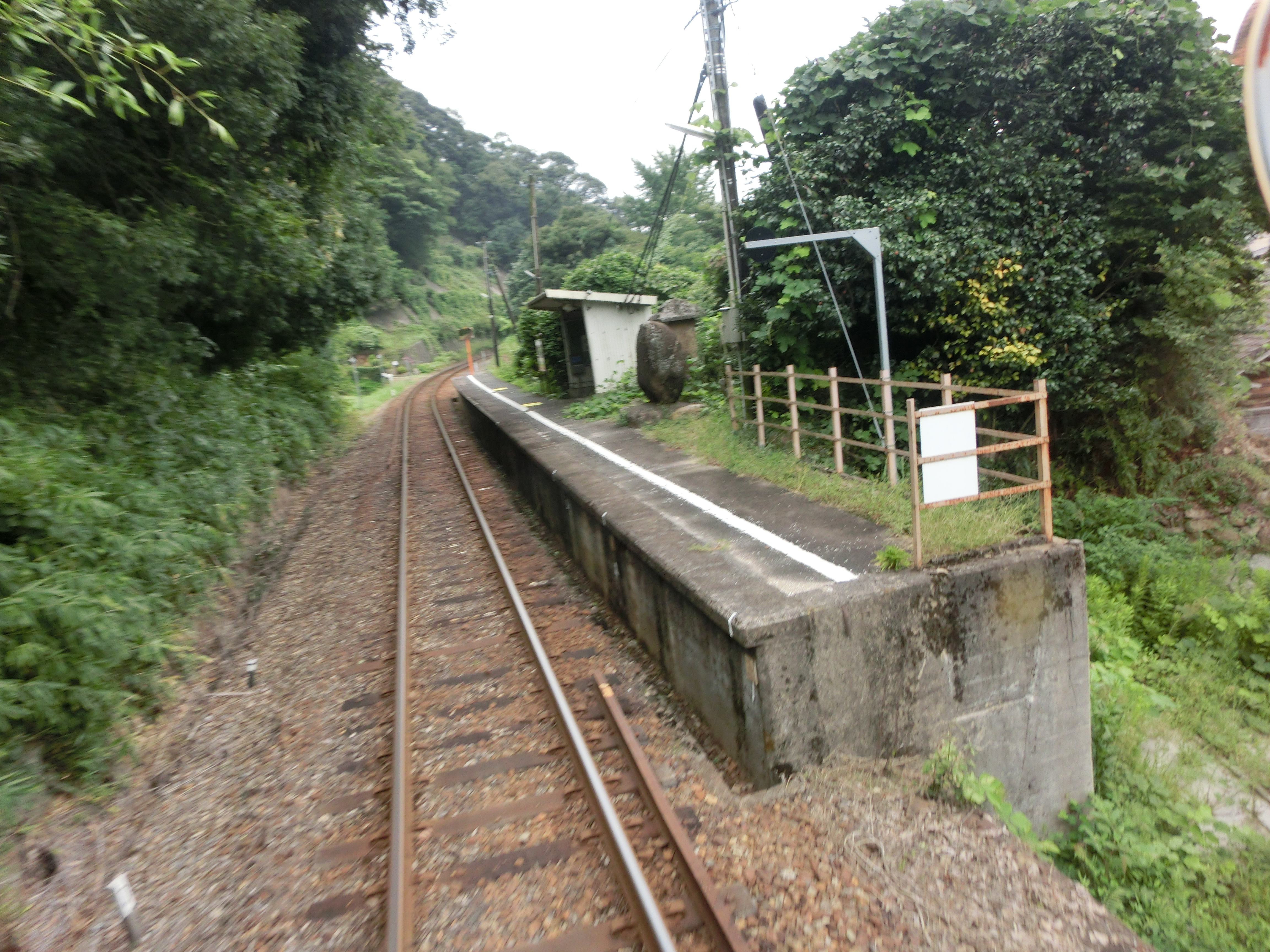 南宍道駅ホーム全体(宍道行き列車後方より撮影)